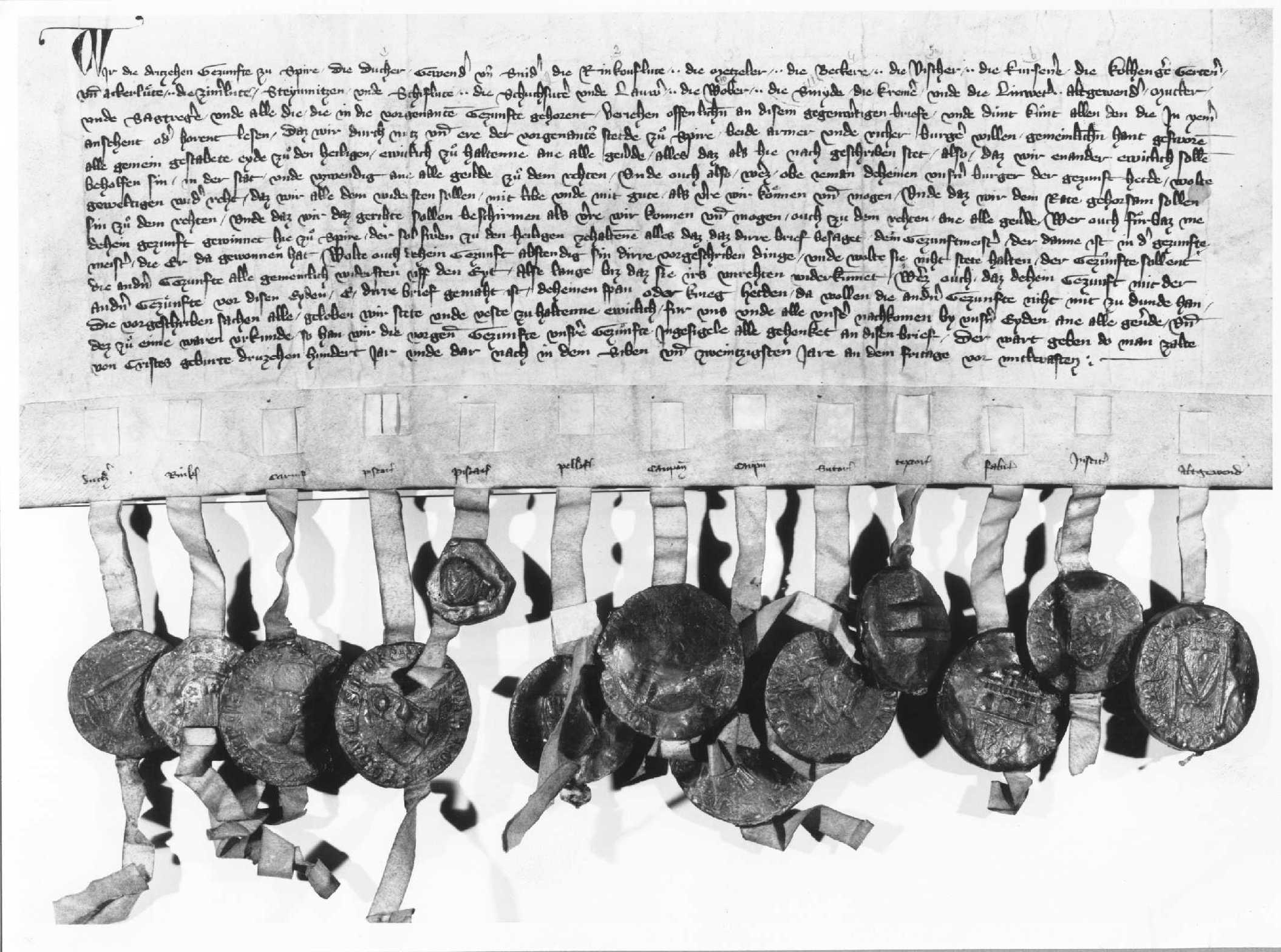 Zunfturkunde im Stadtarchiv Speyer